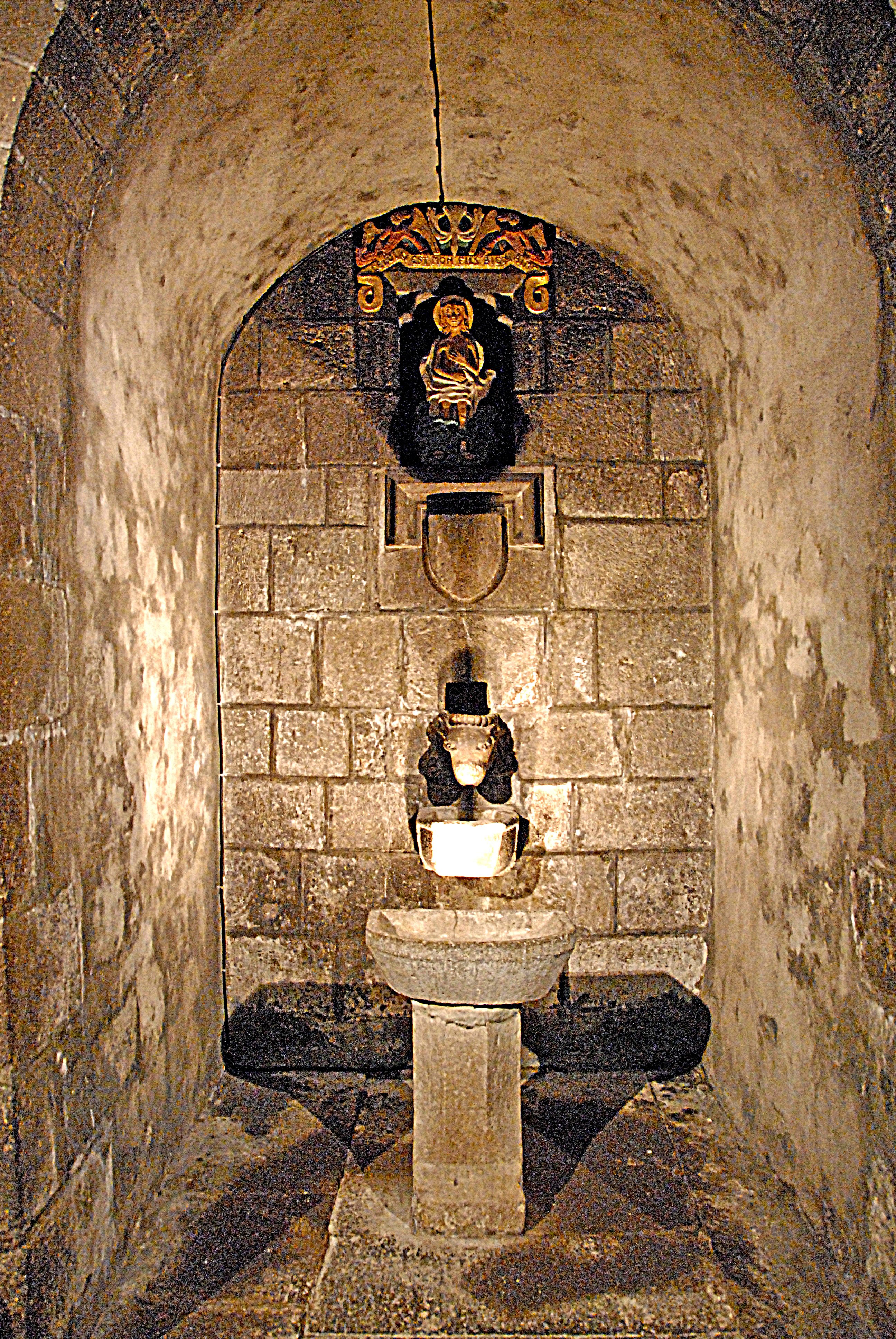 N.-Dame d'Orcival, Taufnische in Narthex